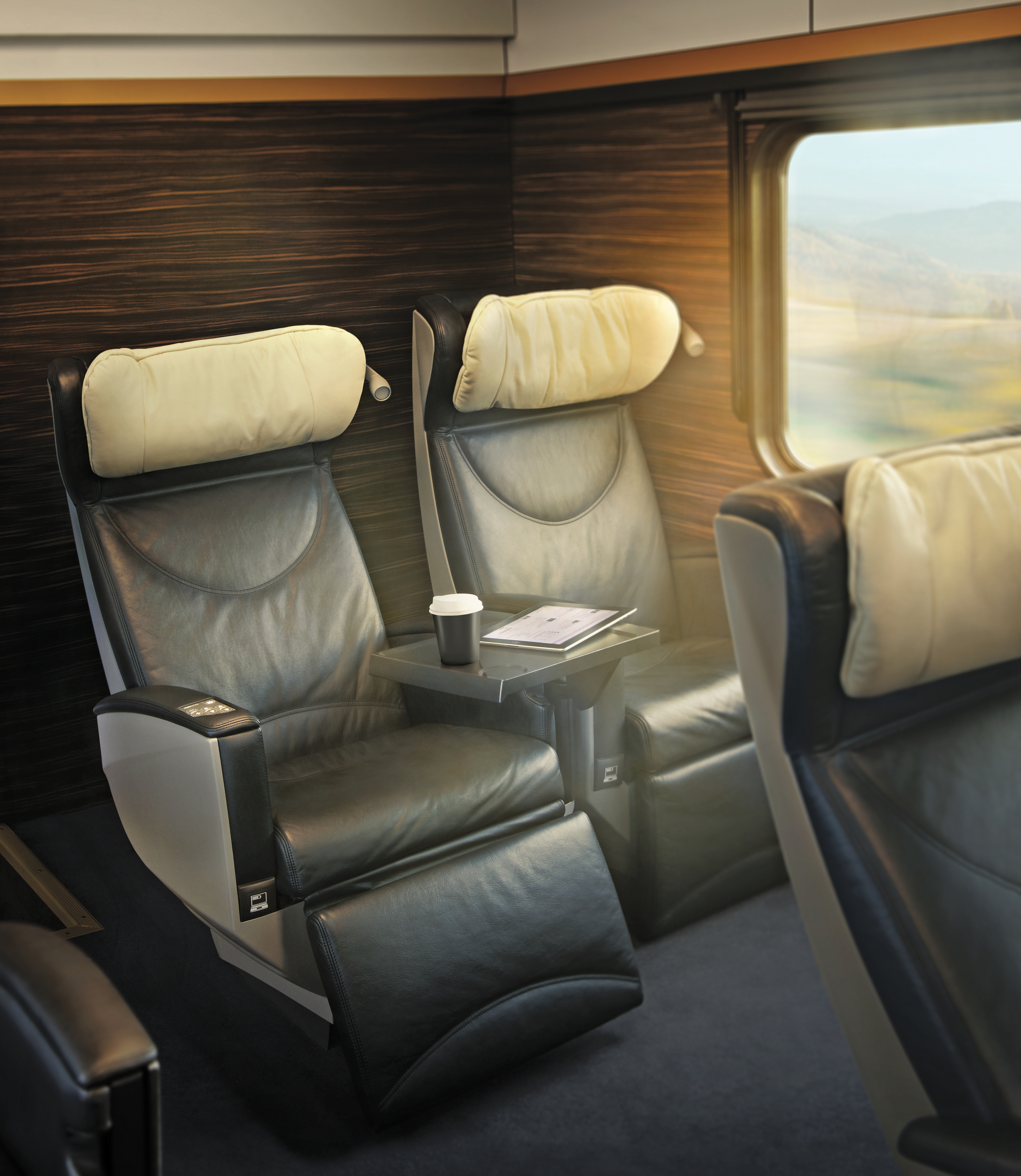 Premium Class - 1. třída ve vlacích Leo Express